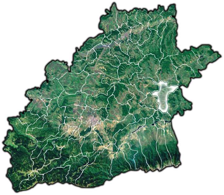 Chirpar jud Sibiu